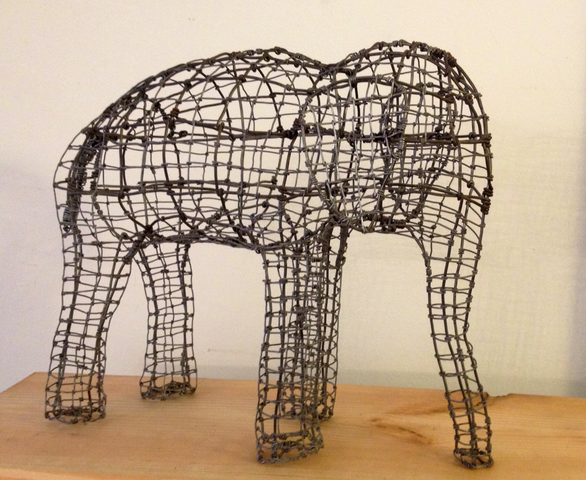 טכניקת Solid - עבודה על הפרטים הקטנים.